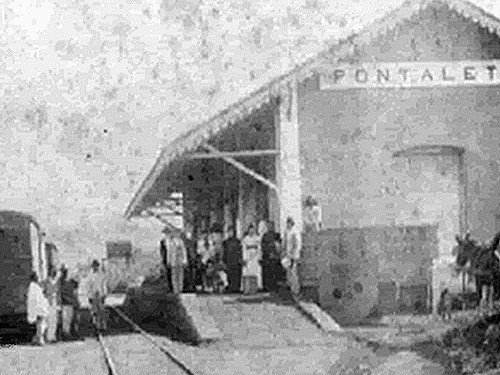 Fotografia da estação ferroviária que existiu no povoado de Pontalete, em Três Pontas. Fotografia de 1926